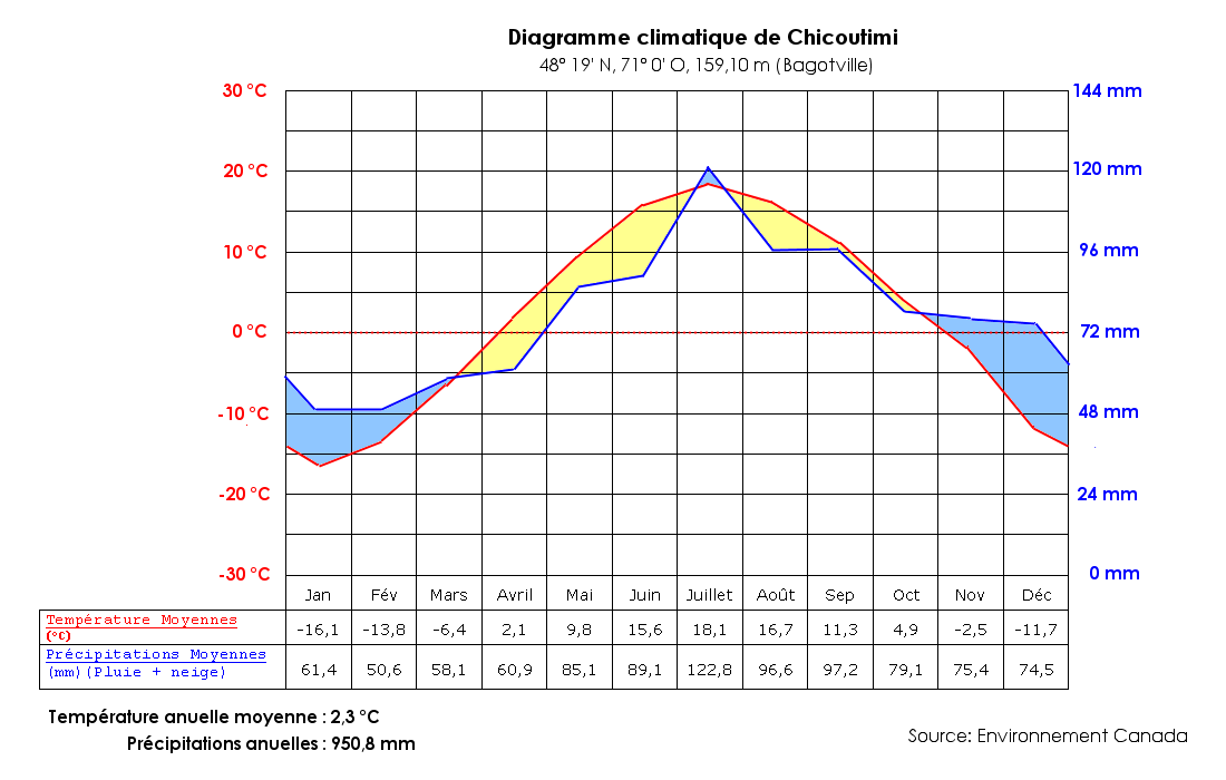 Graphique représentant la température moyenne du Saguenay, ( mesurée à Bagotville)